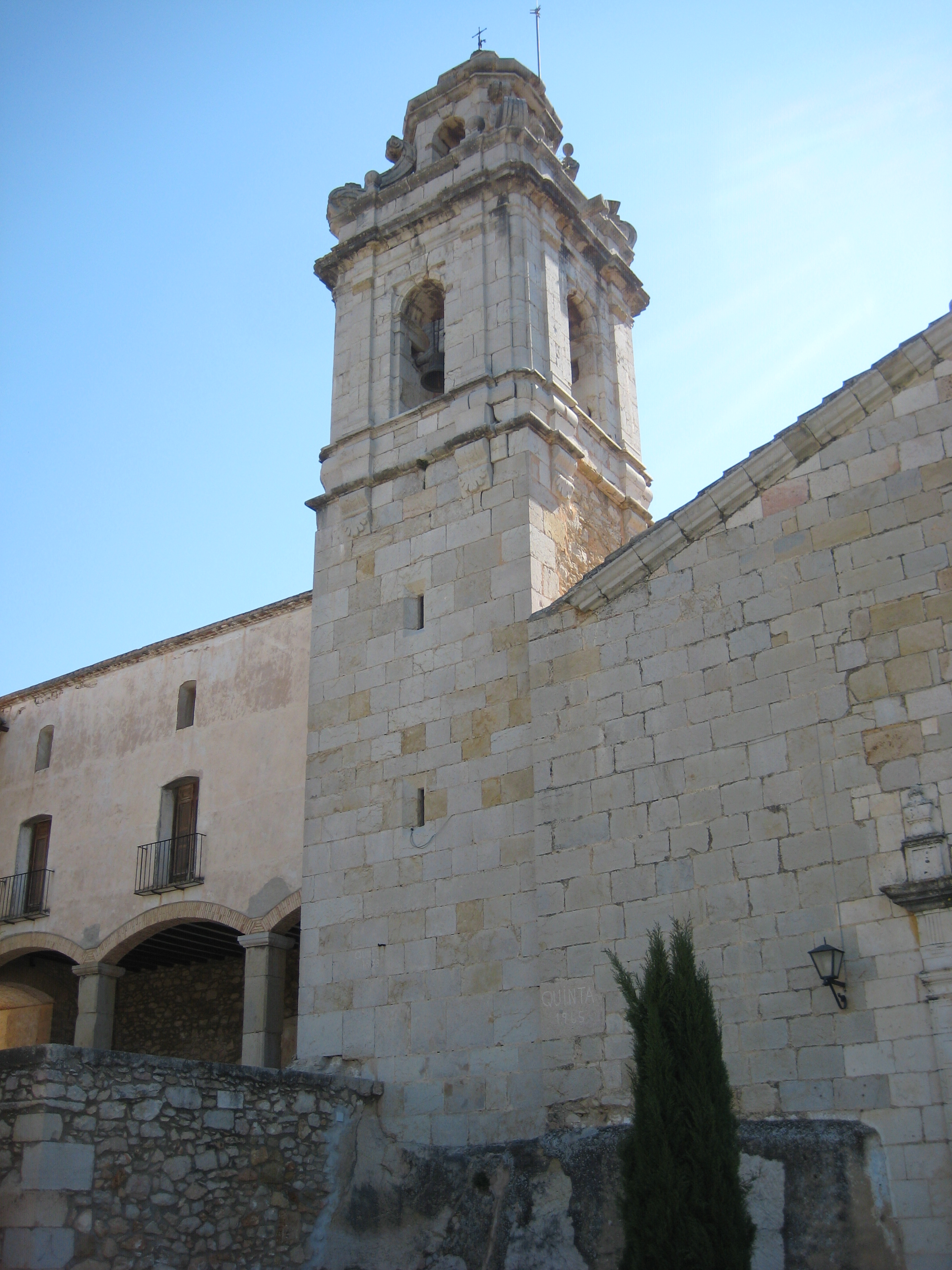 Ermita de la Mere de Déu dels Àngels de Sant Mateu (Baix Maestrat)